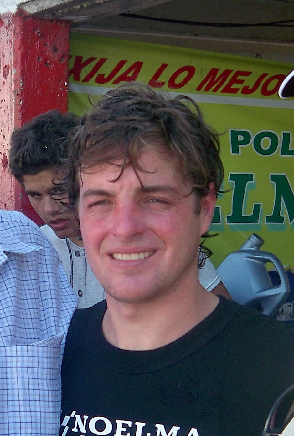 Nicolas Bonelli, Paraná 2013